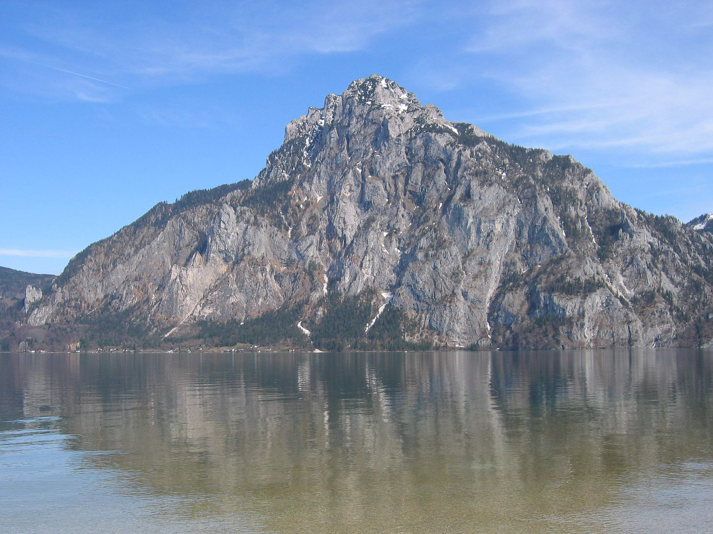 Traunstein (west side) with Traunsee / seen from Bräuwiese